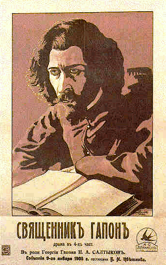 Рекламный плакат художественного фильма А. Дранкова «Священник Гапон», 1917 г.